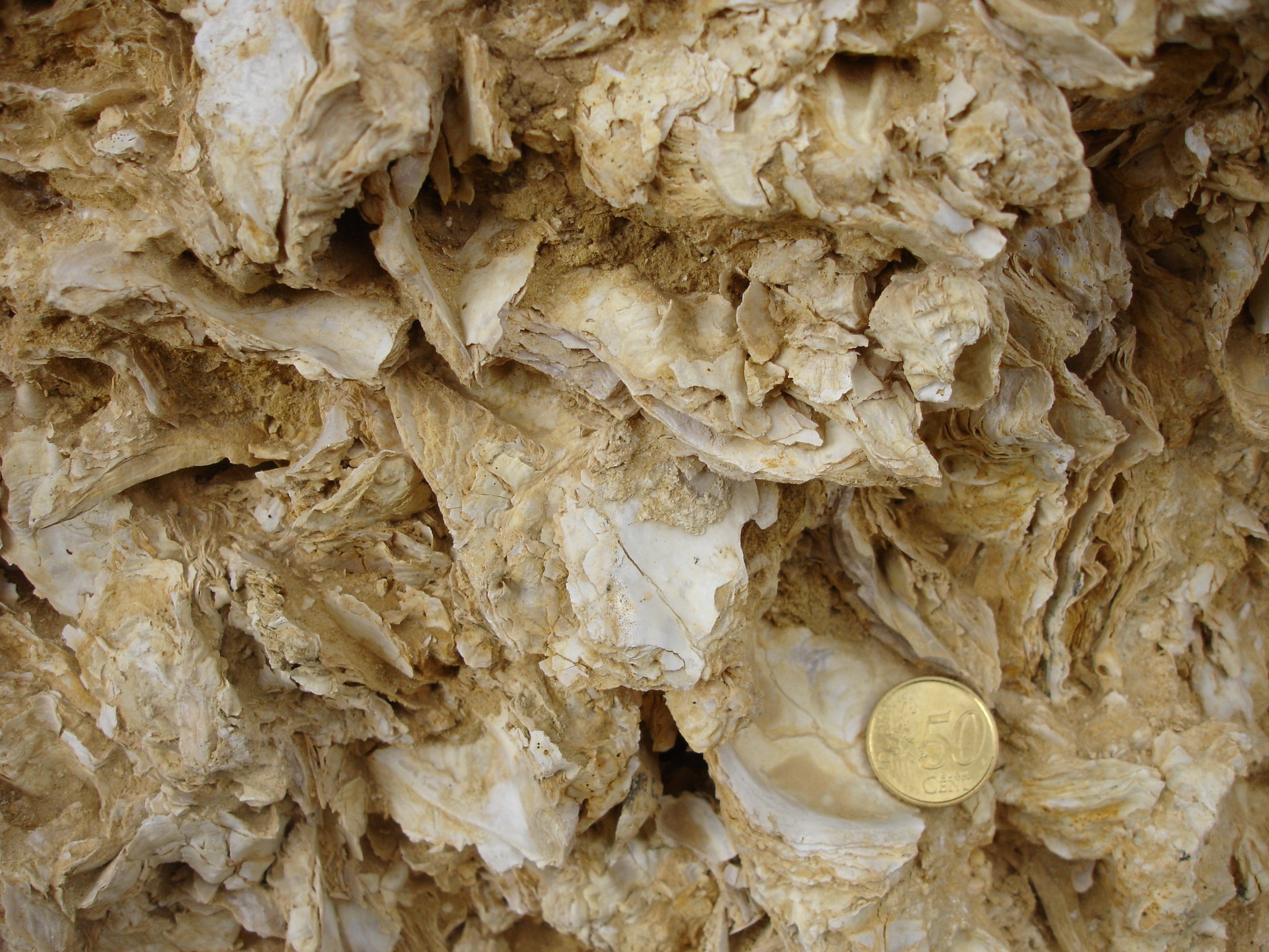 Fossiles d'huitres - Sainte-Croix-Du-Mont, Gironde (33), France